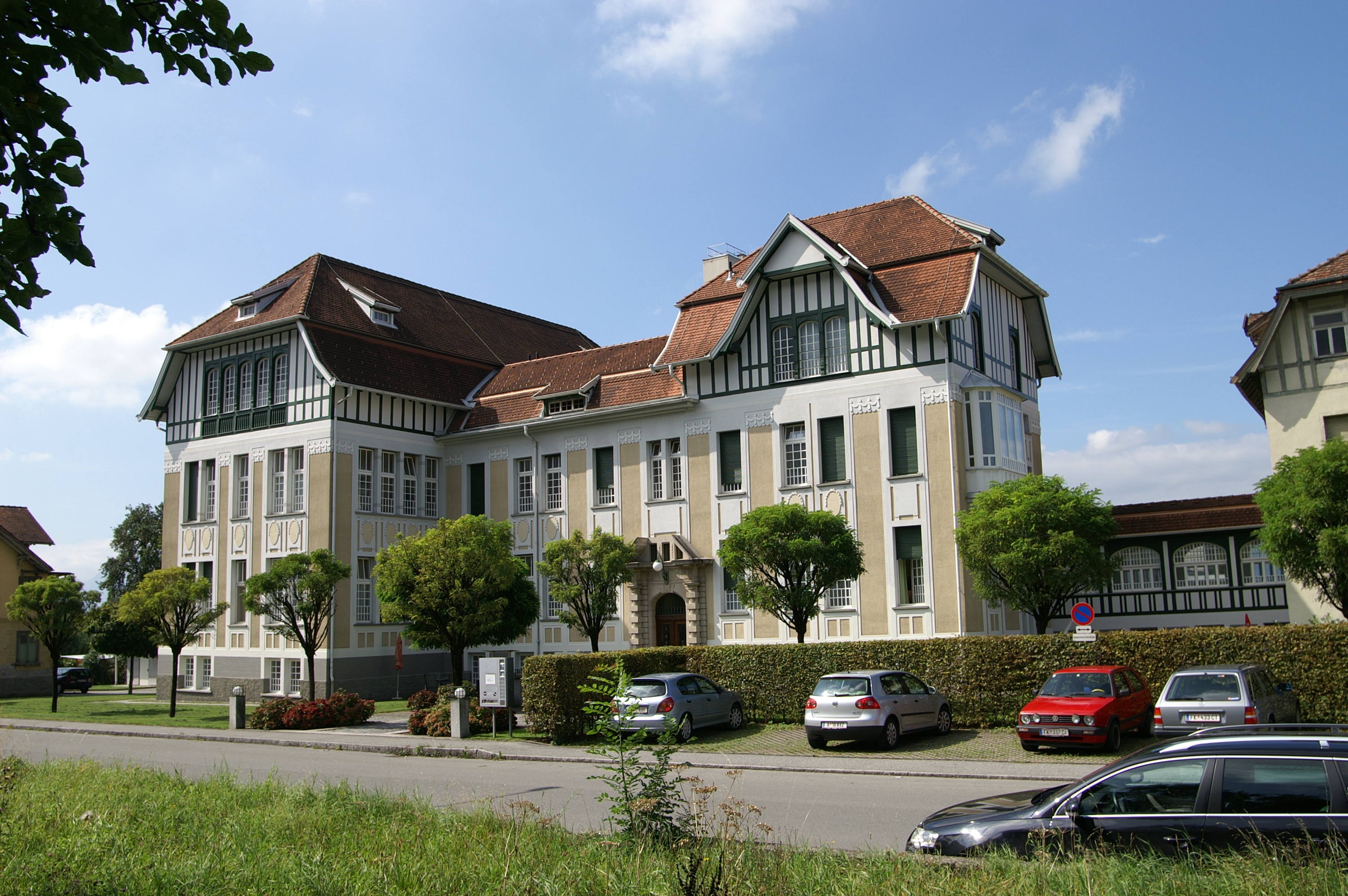 altes Krankenhaus, Kaiserin-Elisabeth-Str. 4-6 in Hohenems Architekt: Hanns Kornberger, Baujahr 1904 + 1905